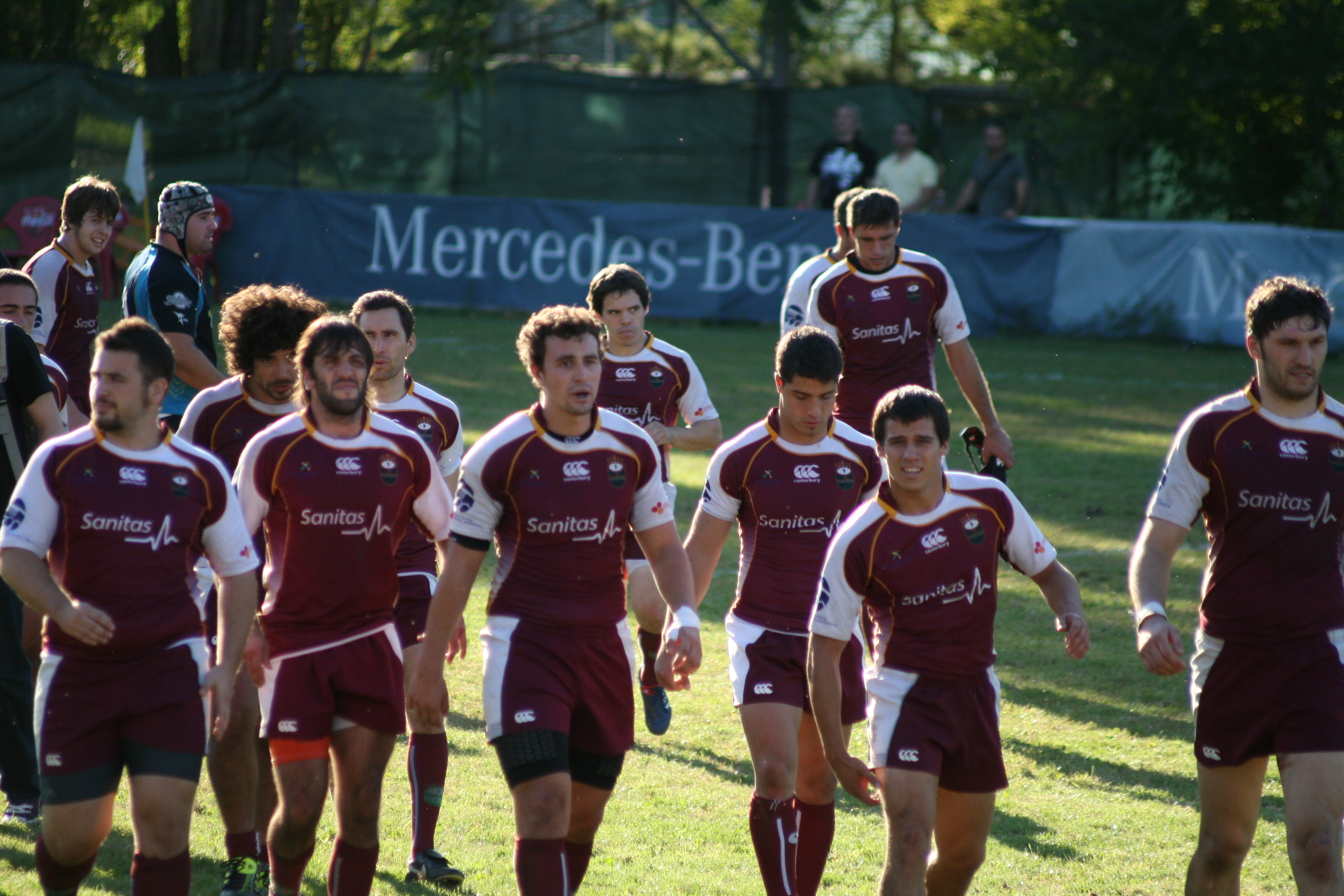 Jugadores del Alcobendas Rugby tras partido de División de Honor